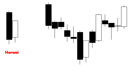 Analisi Tecnica, Candele giapponesi, Harami.